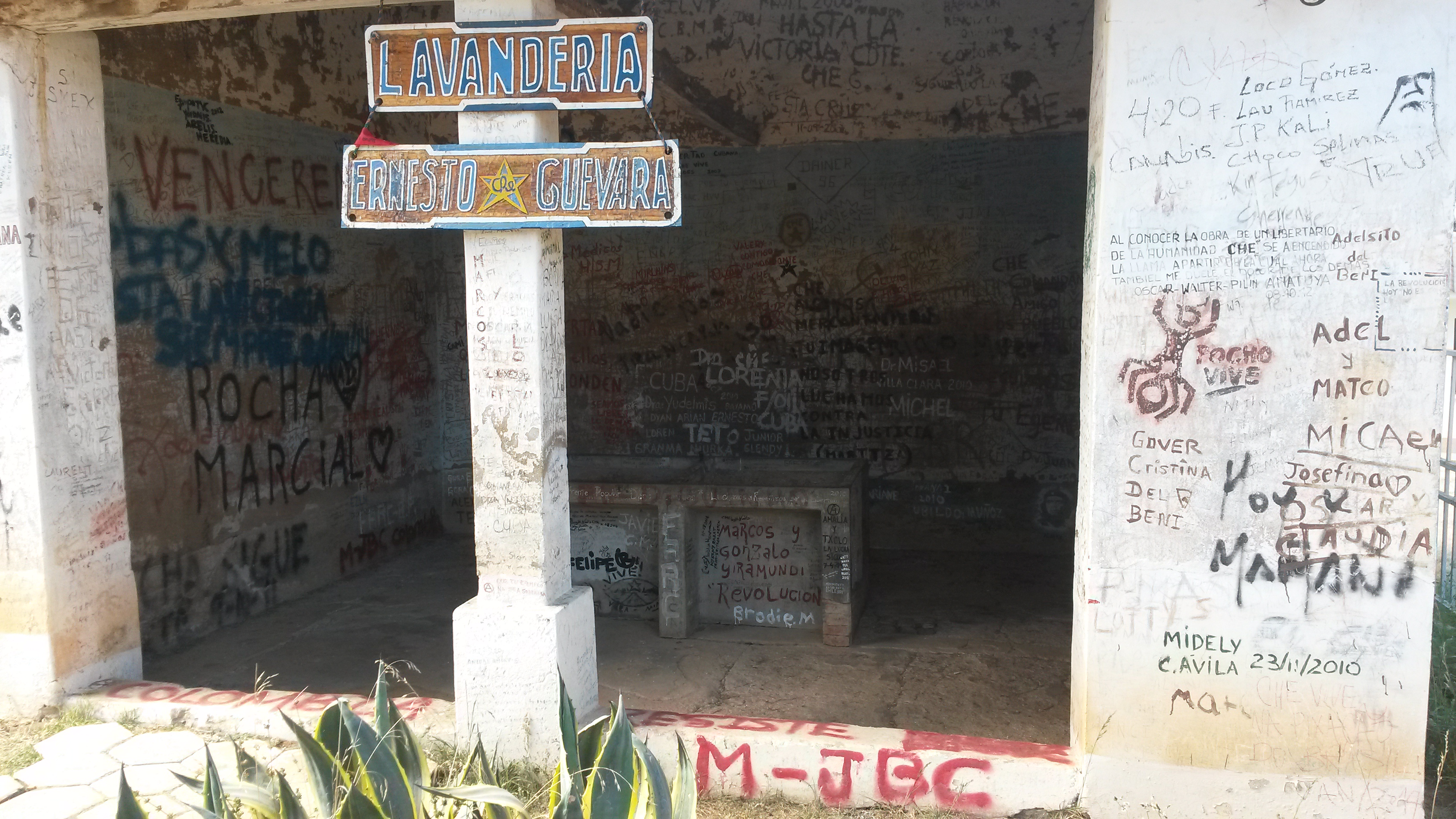 lavanderia donde se expuso el cuerpo del che